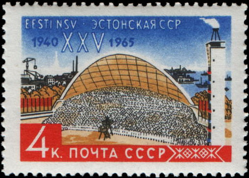 Почтовая марка СССР к 25-летию Эстонской ССР. Певческое поле в Таллине, 1965